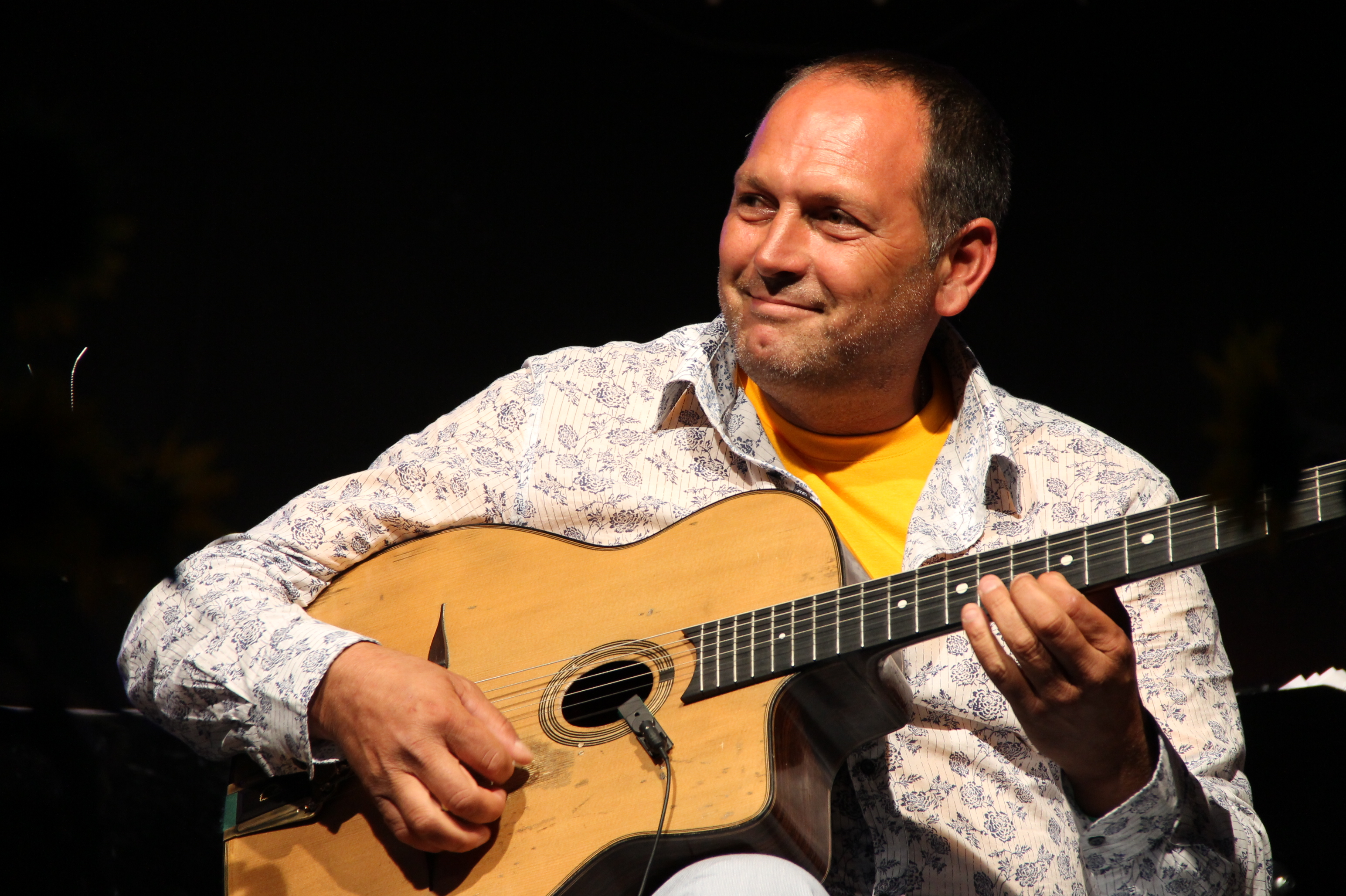 Stochelo Rosenberg